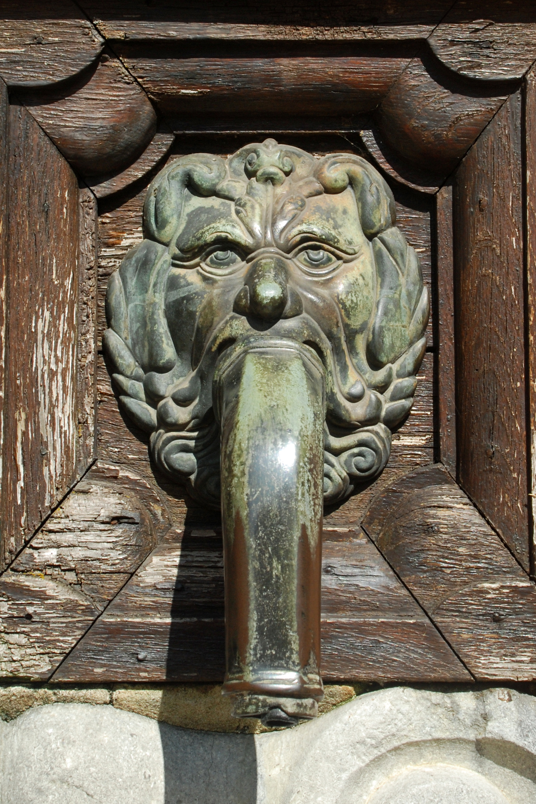 Belgium - Leuven - Groot Begijnhof - Convent van Lommel - Benedenstraat 41